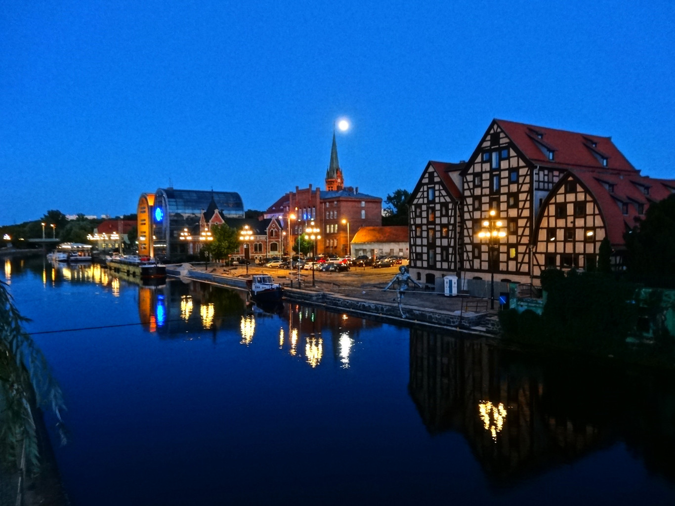 Południowe nabrzeże Brdy w centrum Bydgoszczy